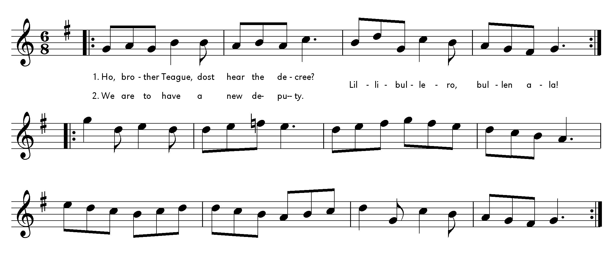 Melodie des Volksliedes Lillibullero mit dem Text der ersten Strophe, Henry Purcell zugeschrieben